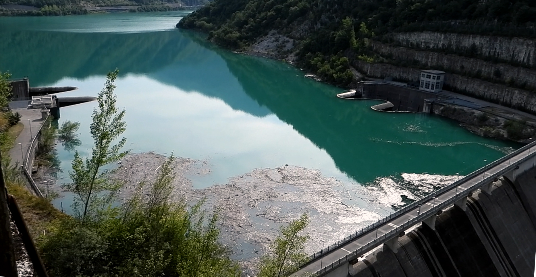 Lago di Ravedis